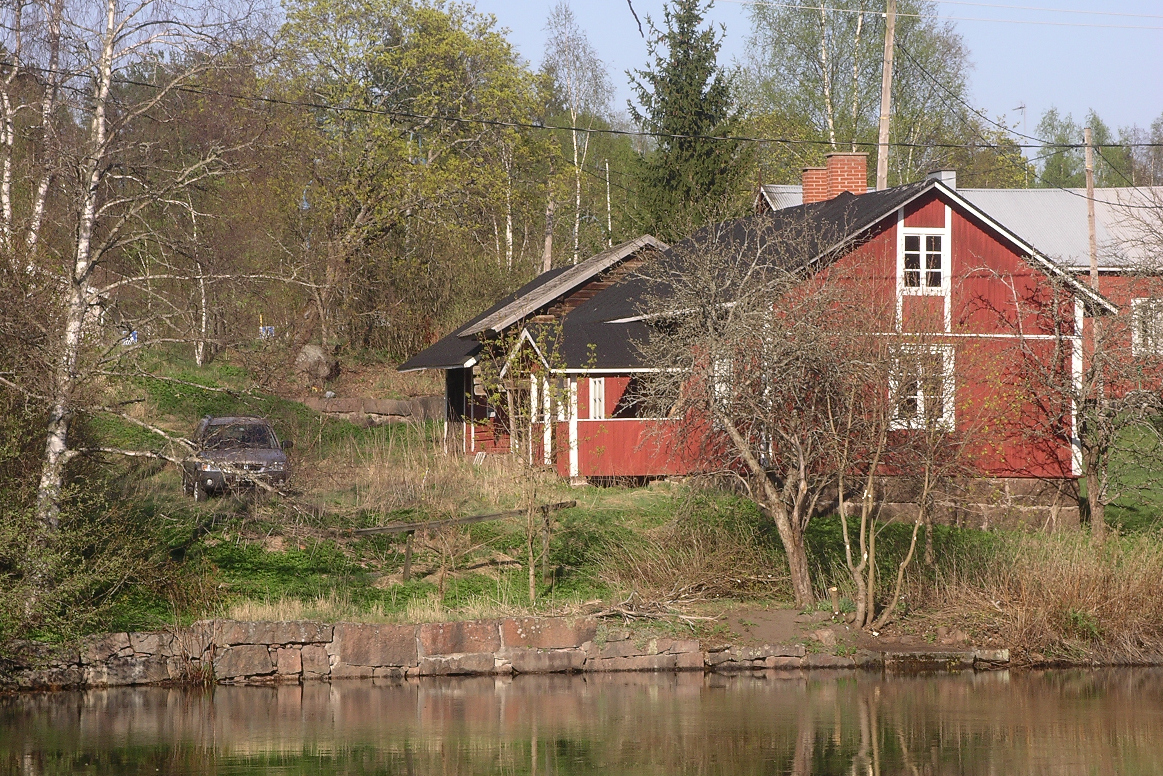 Pyttis Österkyrkoby Äldre gård vid Kymmene älv (Pyhtää)